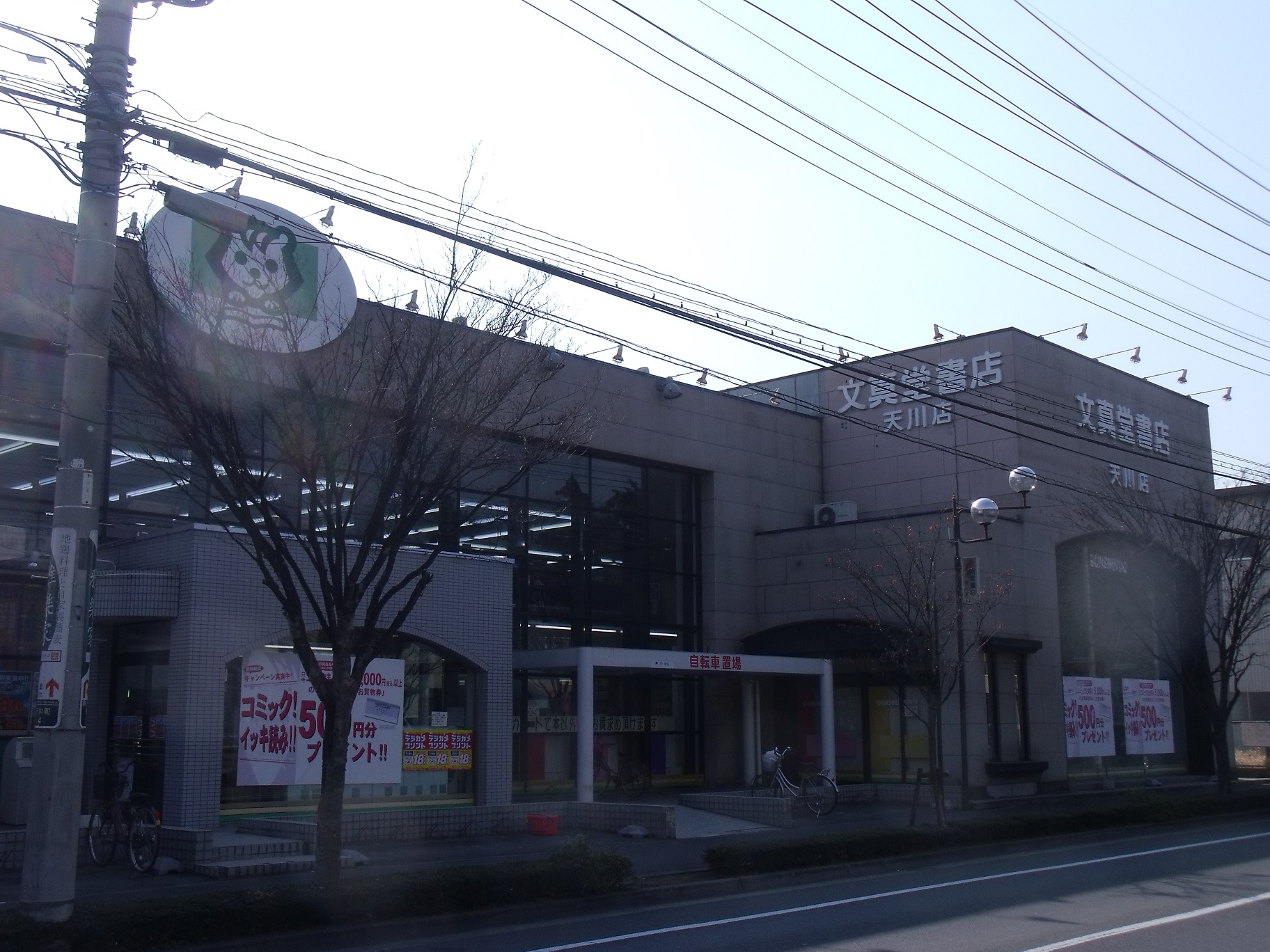 本人による撮影